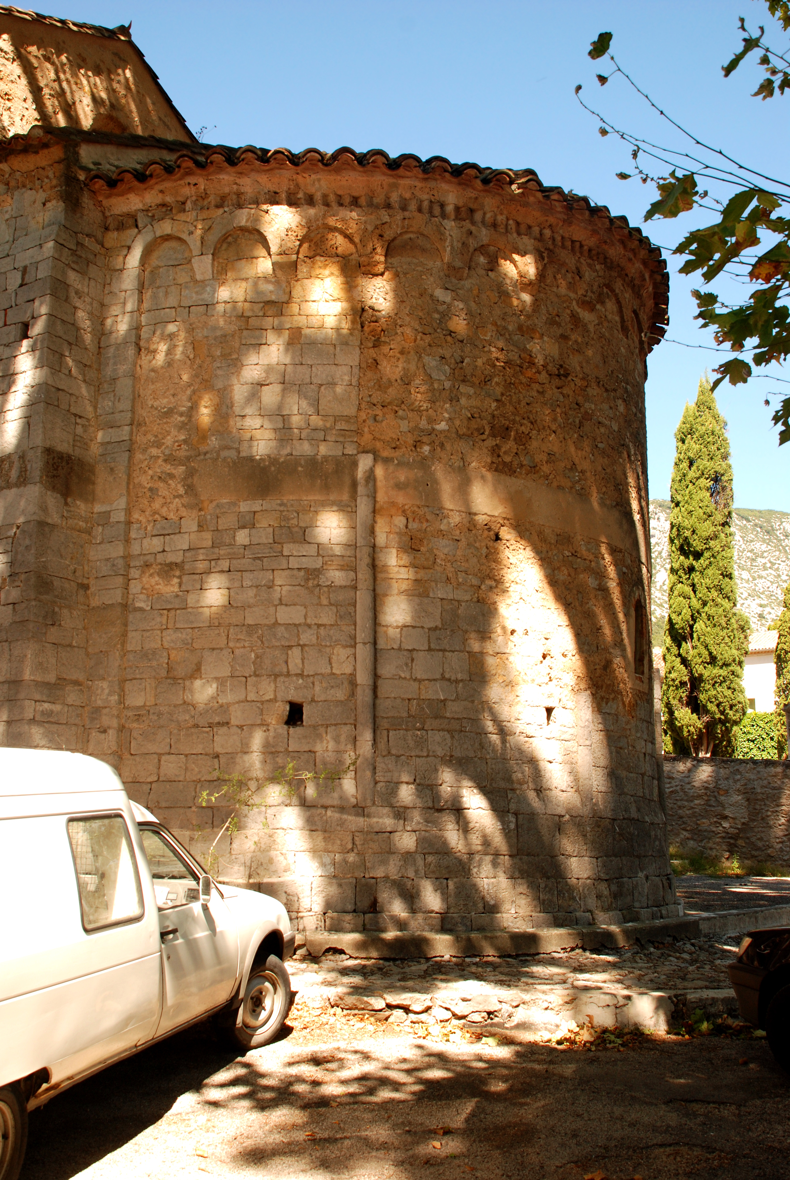 France - Hérault - Église de Saint-Jean-de-Buèges